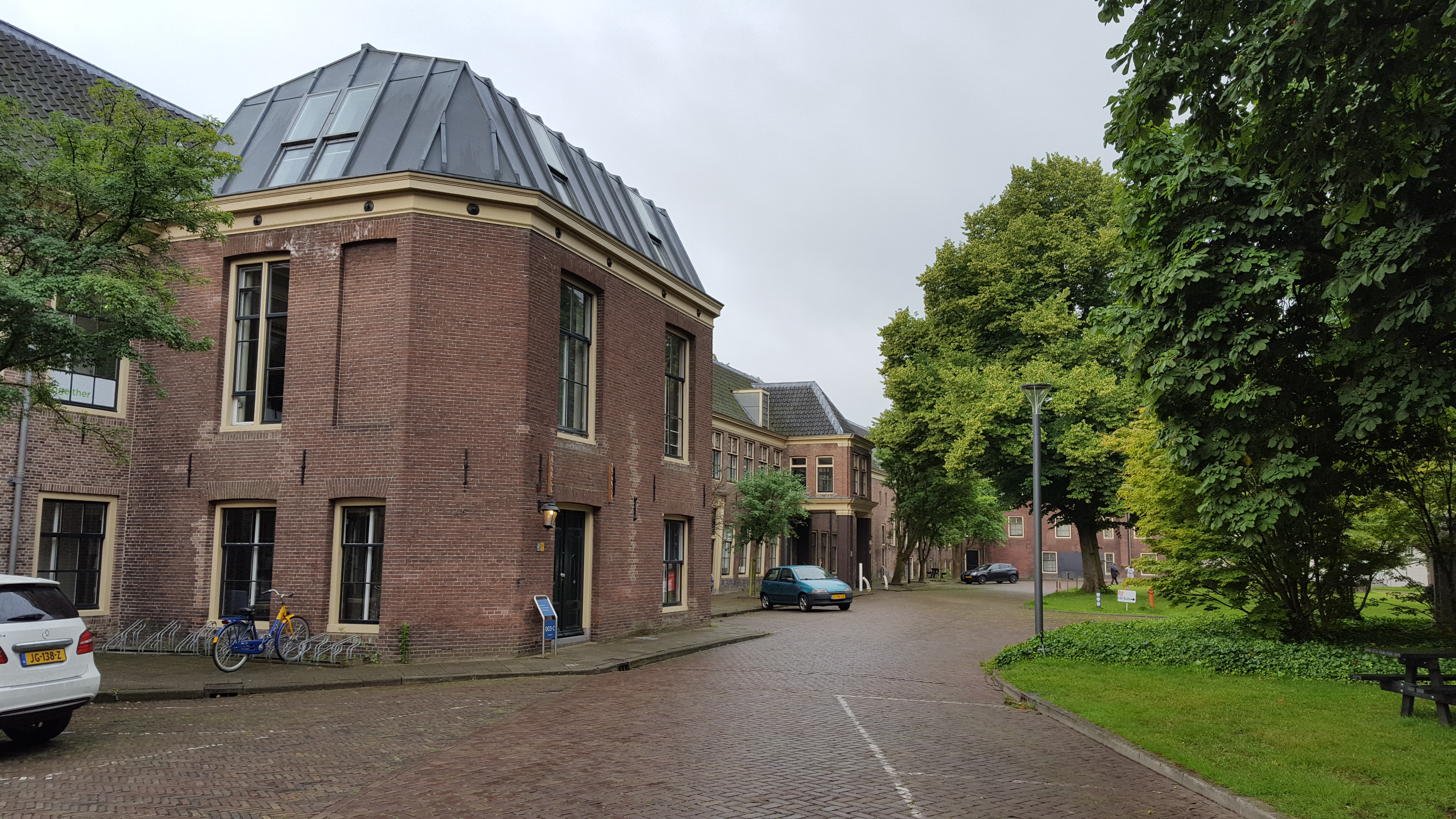 Marinegebouwen aan de Kattenburgerstraat, Amsterdam